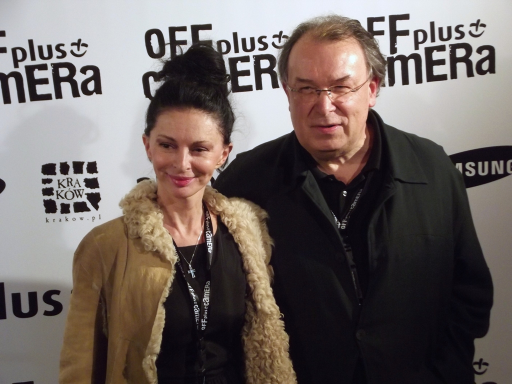 Lech Majewski z żoną podczas 6. edycji międzynarodowego festiwalu kina niezależnego Off Plus Camera.